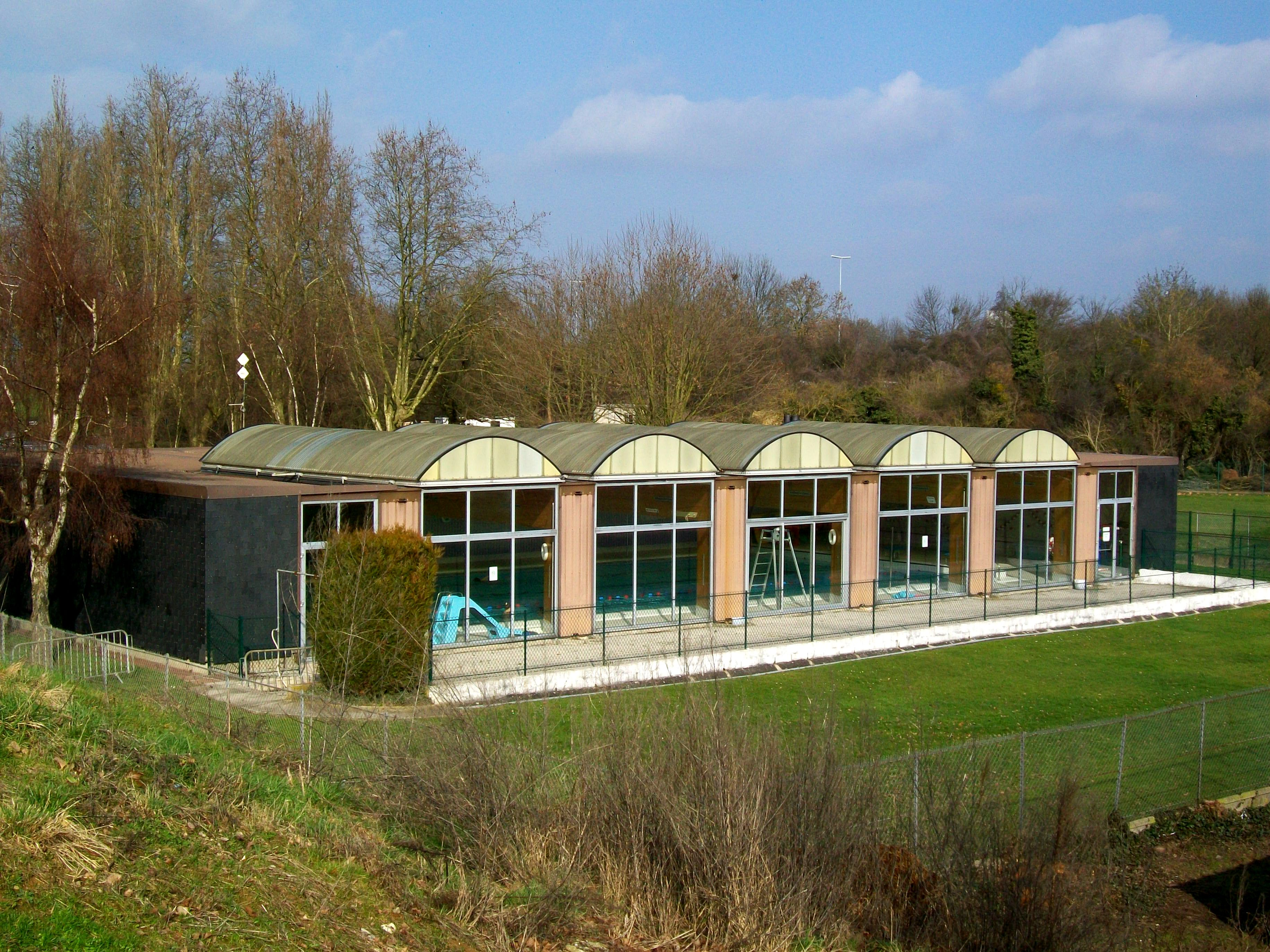 La piscine intercommunale de Survilliers.